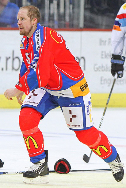 Le joueur des ZSC Lions Mathias Seger